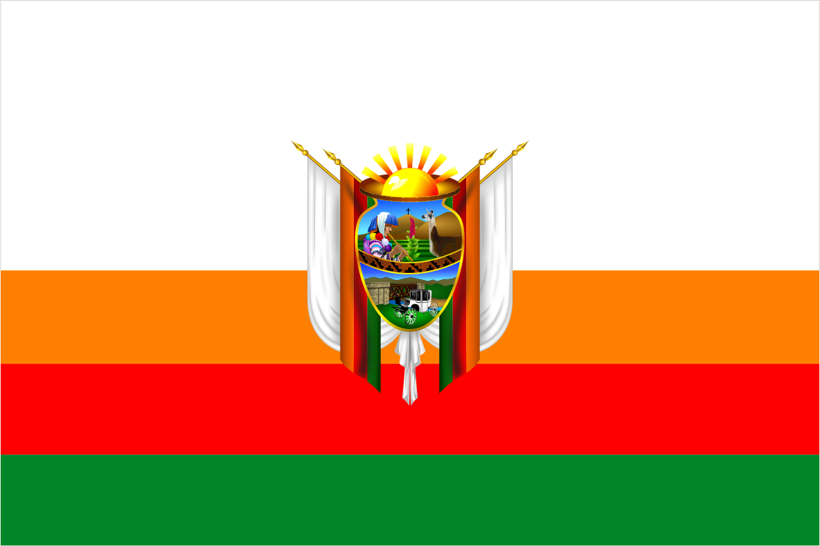 Distrito de Tirapata - Provincia Azángaro - Región Puno